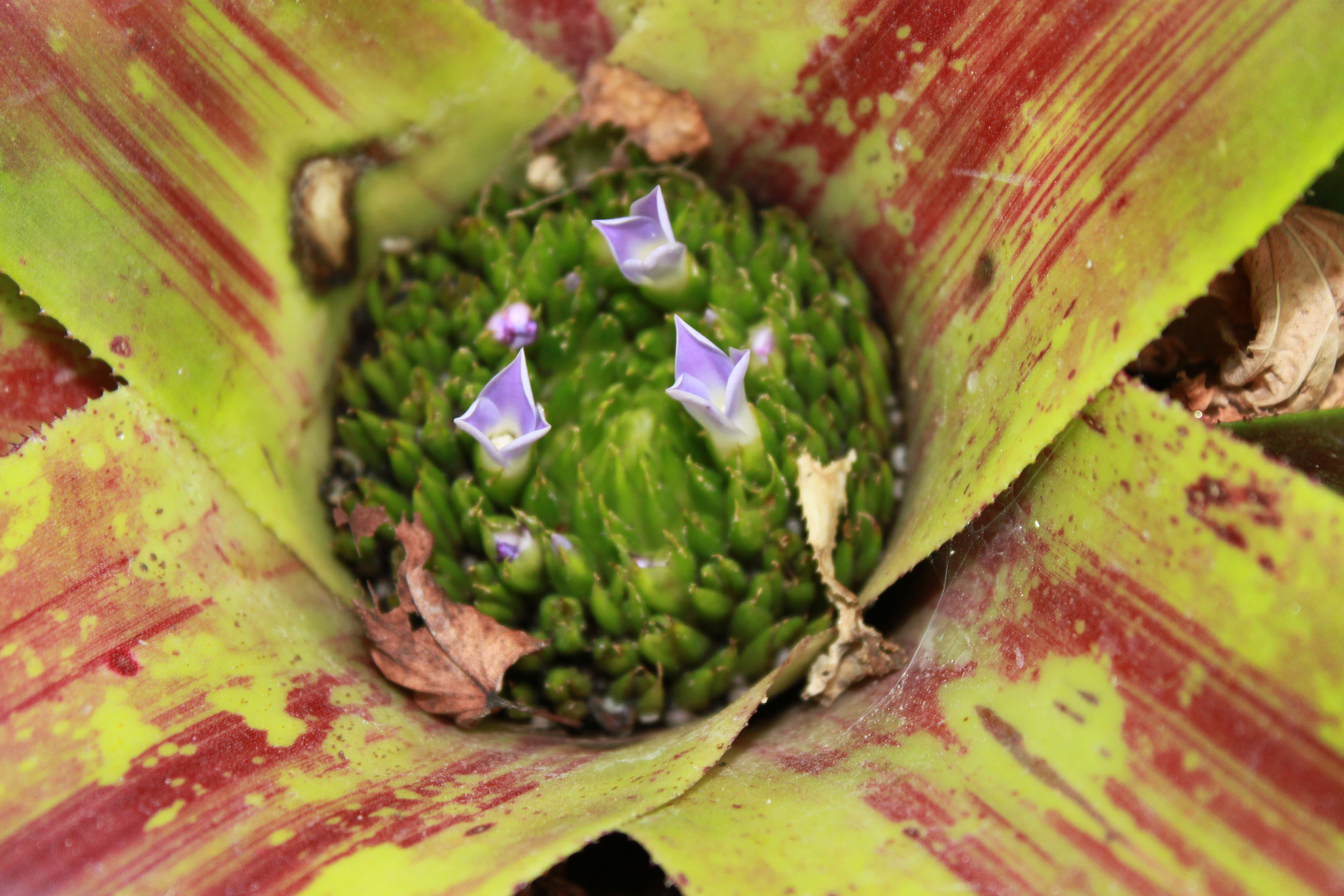 Neoregelia farinosa ejemplar del Jardín botánico de Valencia, Universidad de Valencia, Valencia. España.